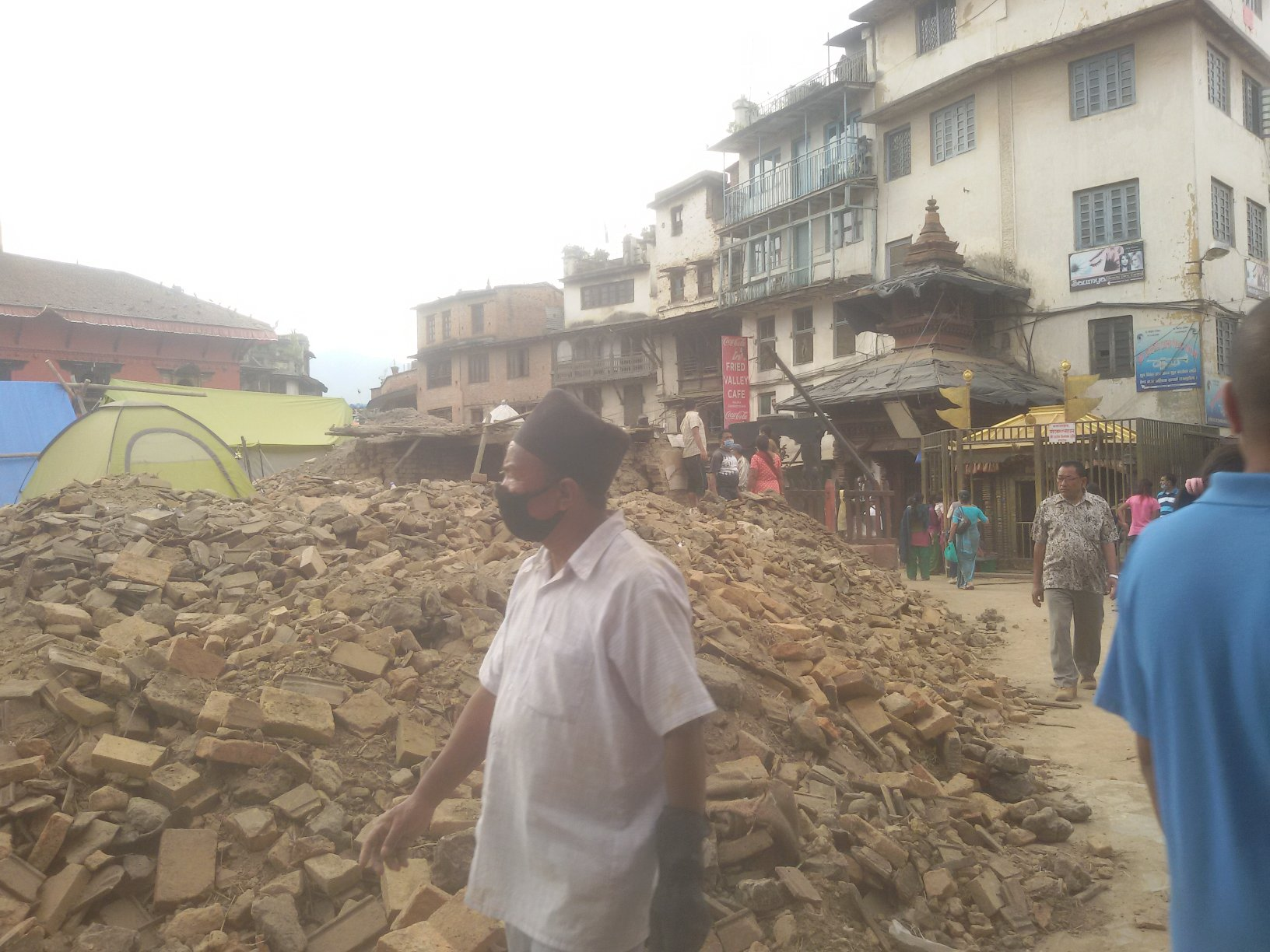 नेपाली: Basantapur Temple Kathmandu, Nepal